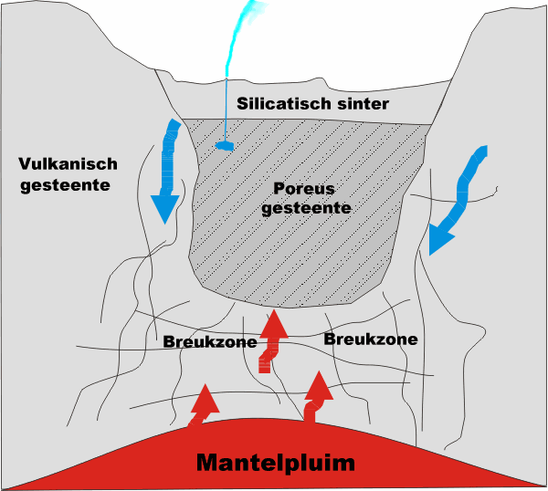 Schema van een geiser naar White 1967.